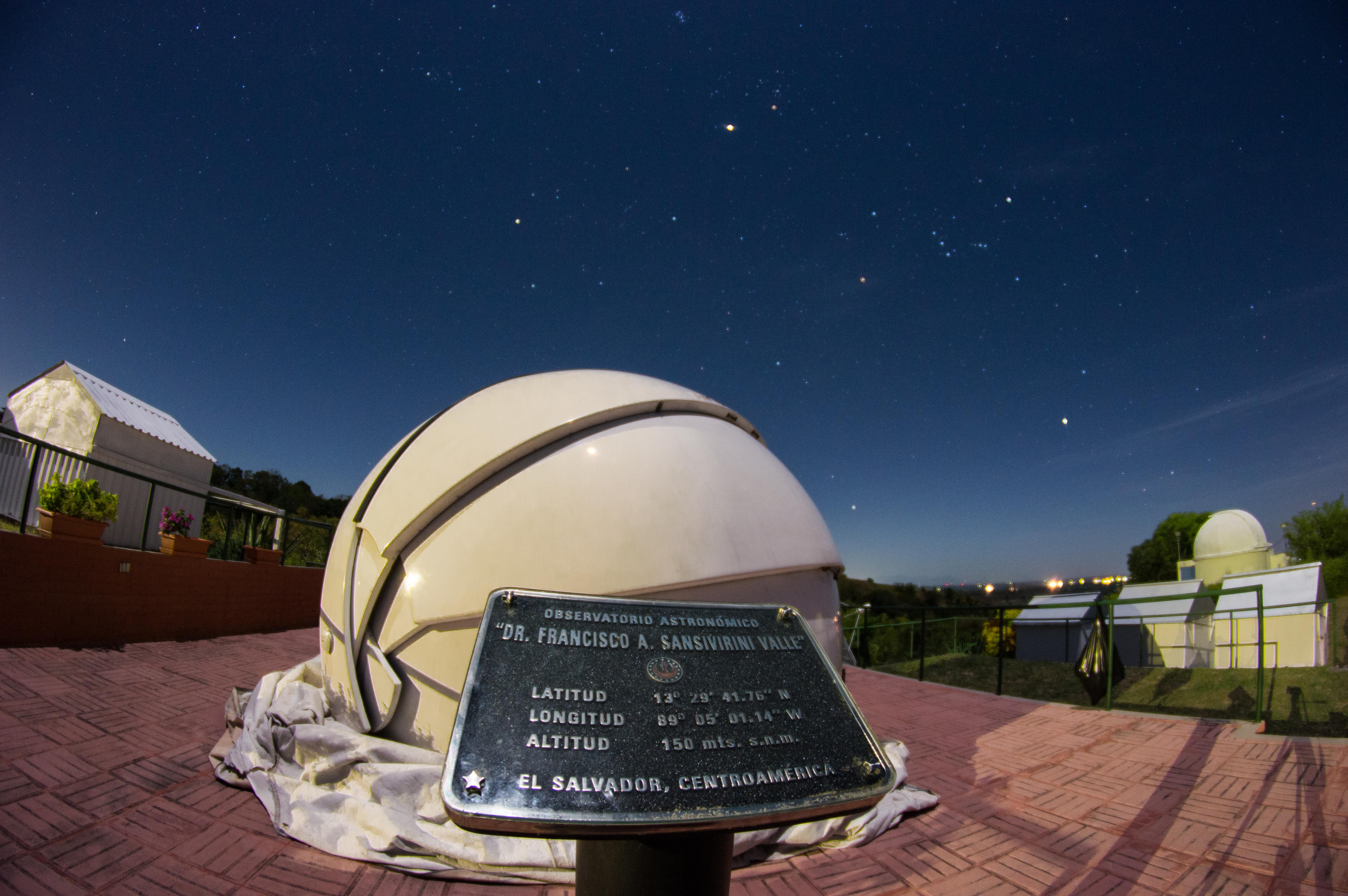 El Observatorio "Dr. Prudencio Llach" es el primer observatorio a nivel de aficionados que funciona en El Salvador. El observatorio se encuentra a unos 40 Km al suroeste de San Salvador. Se puede llegar a él usando la carretera que desde la capital conduce hacia el Aeropuerto Internacional El Salvador, y tomando el desvío hacia el pueblo de San Juan Talpa, a la altura del Km 34, atravesando el pueblo (vea el mapa adjunto), y siguiendo la calle principal del mismo. Luego, medio kilómetro después de la salida del pueblo encontrará el desvío hacia el observatorio a mano derecha.